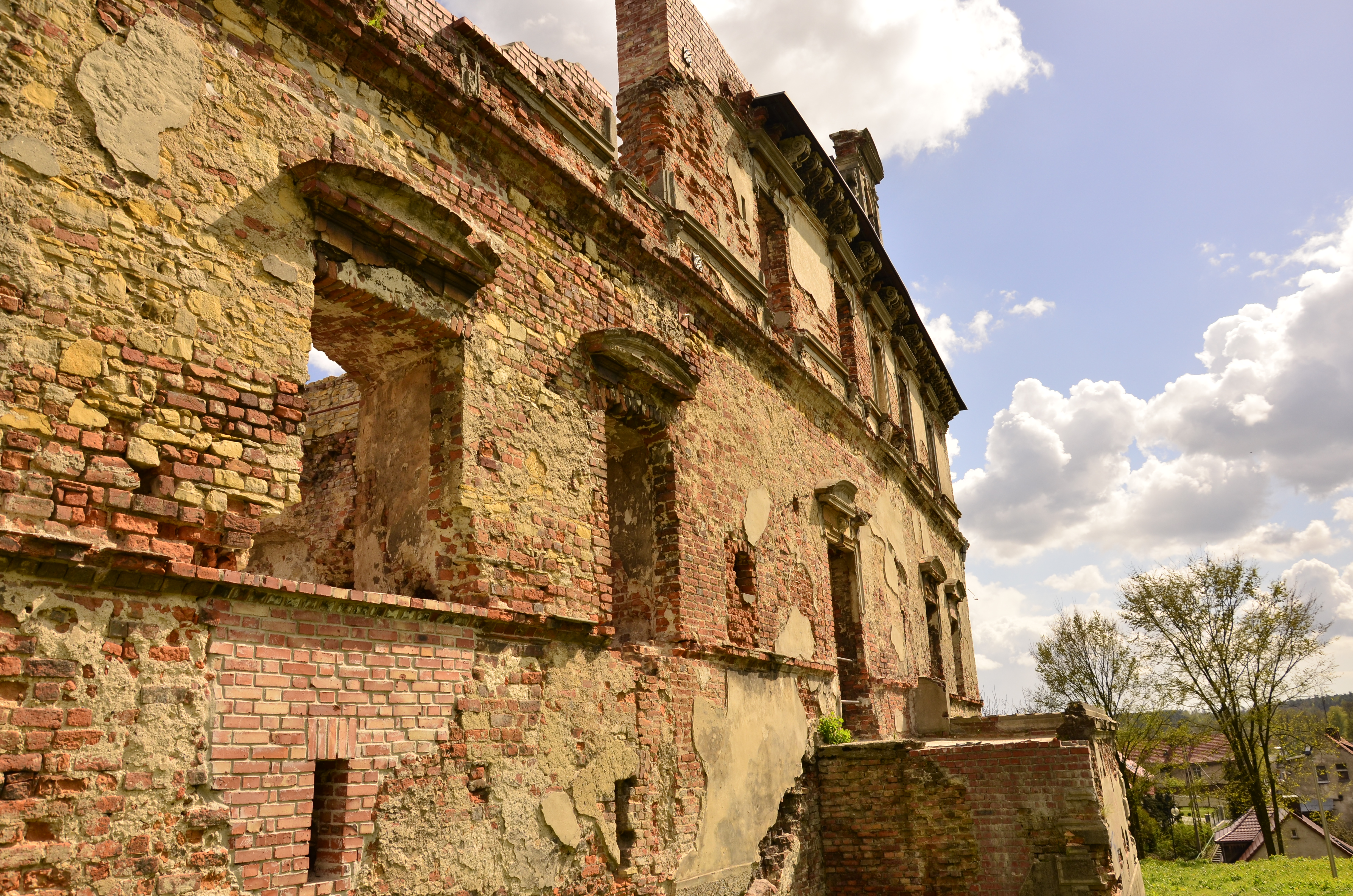 Ujazd, Zamek biskupów wrocławskich w Ujeździe